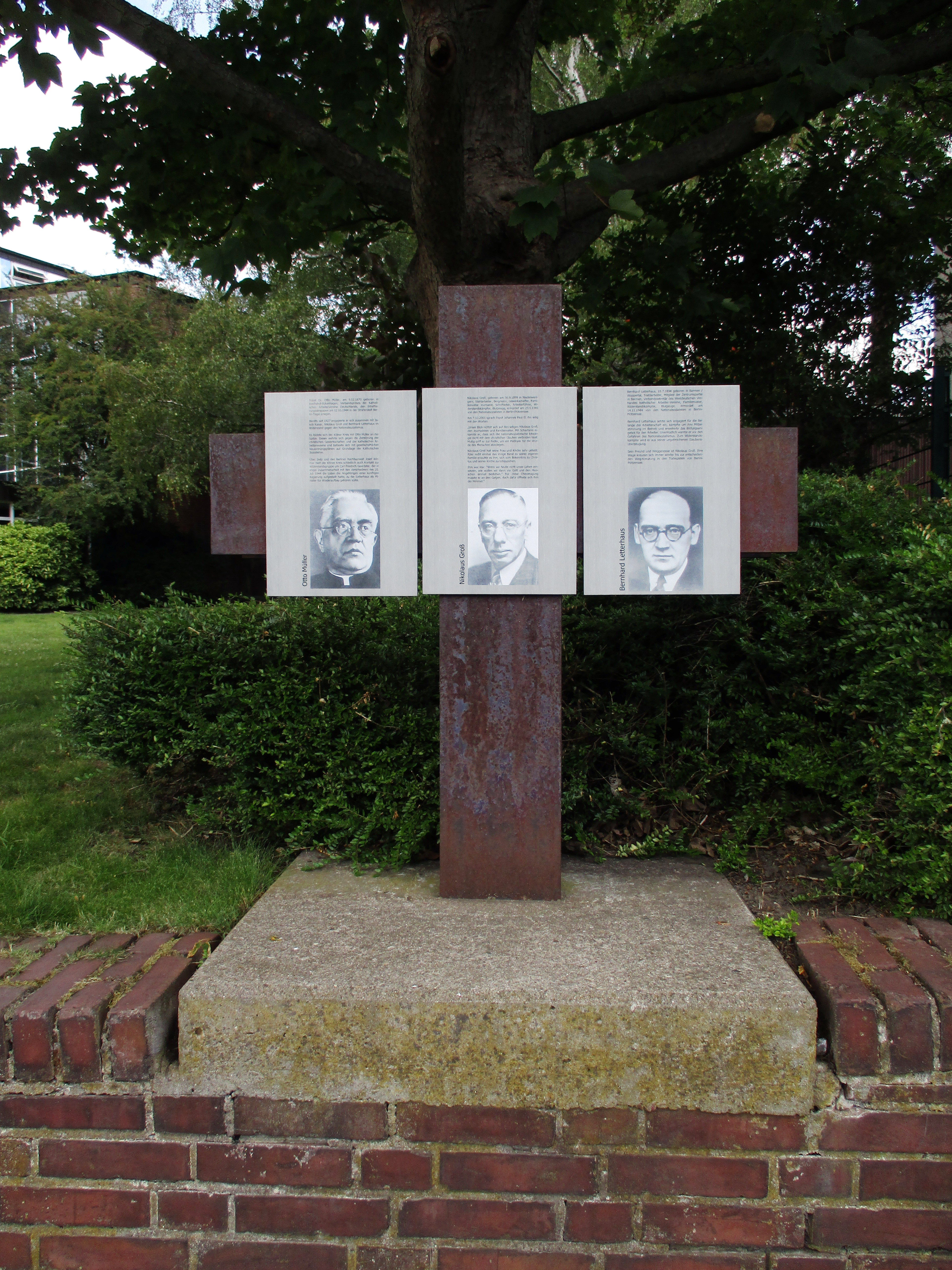 Gedenkkreuz für Widerstandskämpfer gegen die NS-Herrschaft an der St. Barbara Kirche in Mülheim-Dümptenː Otto Müller, Nikolaus Groß, Bernhard Letterhans.